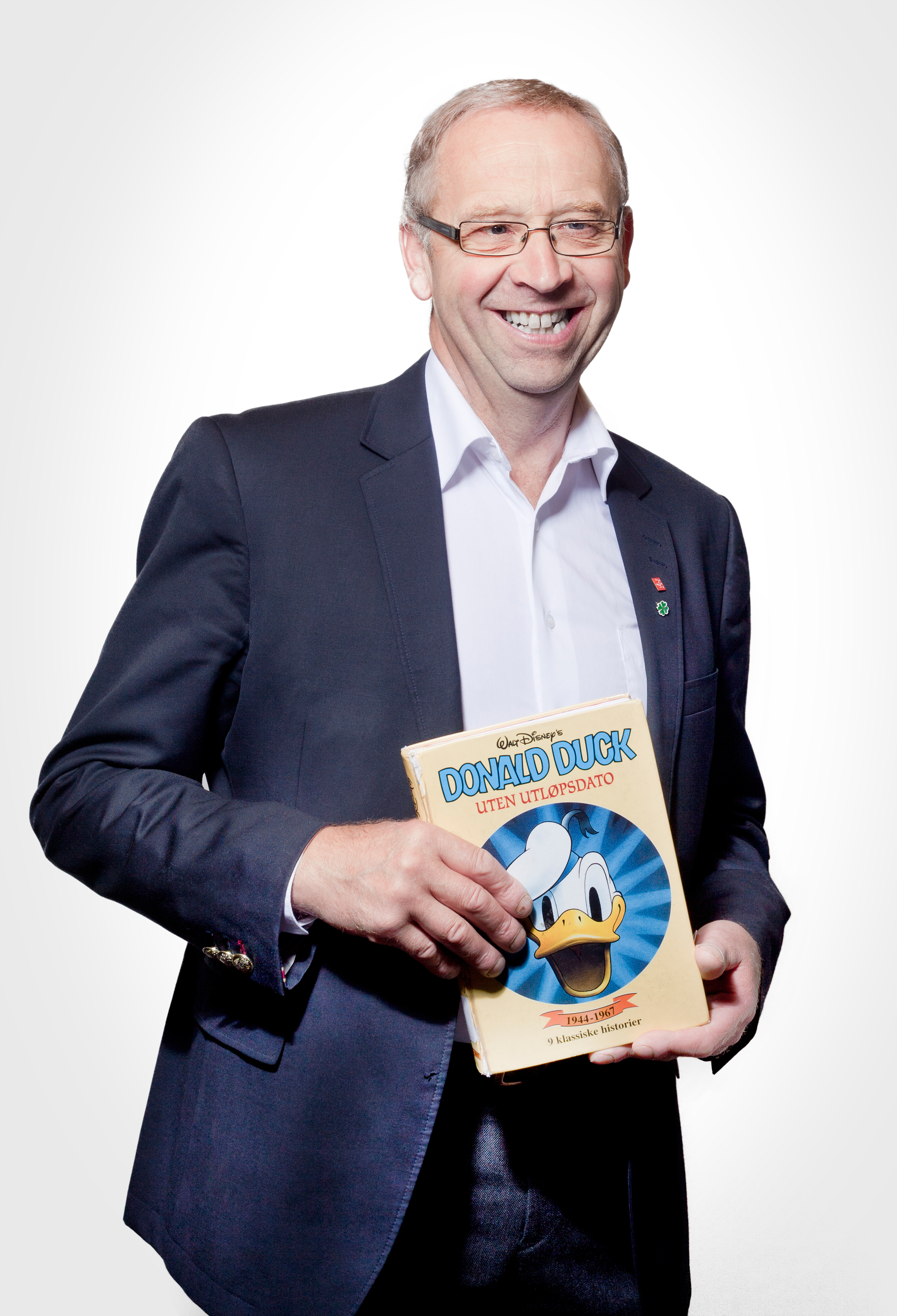 Ordfører Per Helge Johansen fra Leka, Nord-Trøndelag. Bildet er tatt i forbindelse med Nord-Trøndelag fylkesbiblioteks kampanje "Leseambassadører"